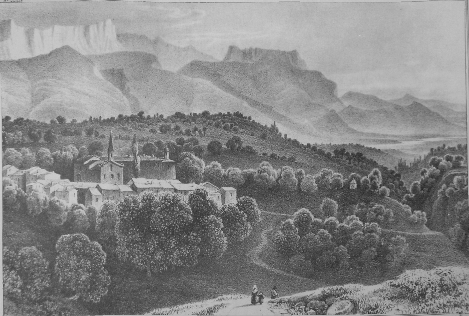 Lozier près Tullins (Isère)ATTENTION ! Ce facsimilé est réalisé en applicant des alterations avec un logiciel graphique à une copie numérique, obtenue à partir d'une prise de photo faite par un non-professionnel. Elle pourrait ne pas être parfaitement réussie.